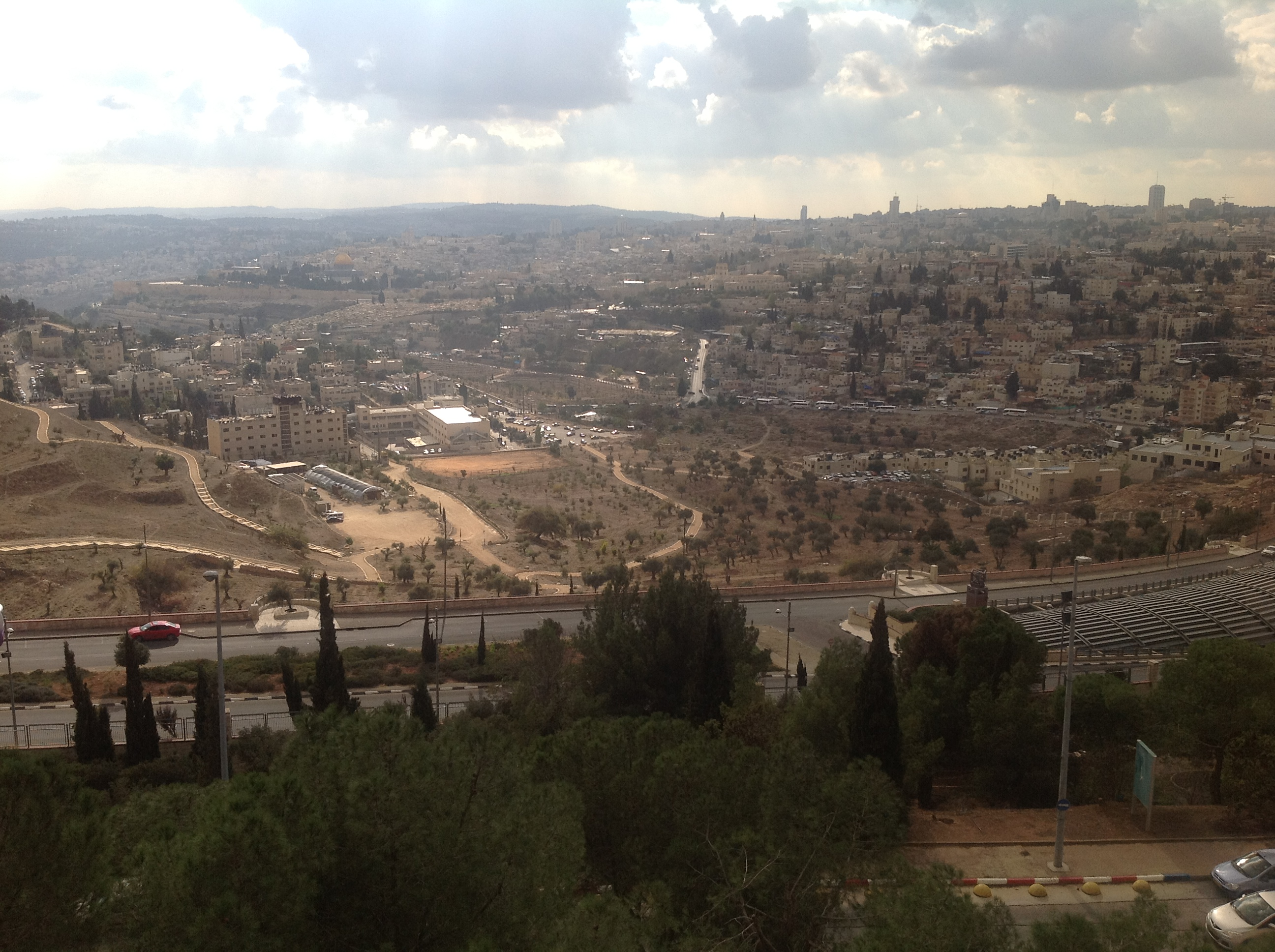 עמק צורים, מהאוניברסיטה העברית. העמק כולל את האזור הנטוע הכלוא בין הכביש למבנים. במרכזו נמצא האוהל בו מתקיים סינון העפר מהר הבית.